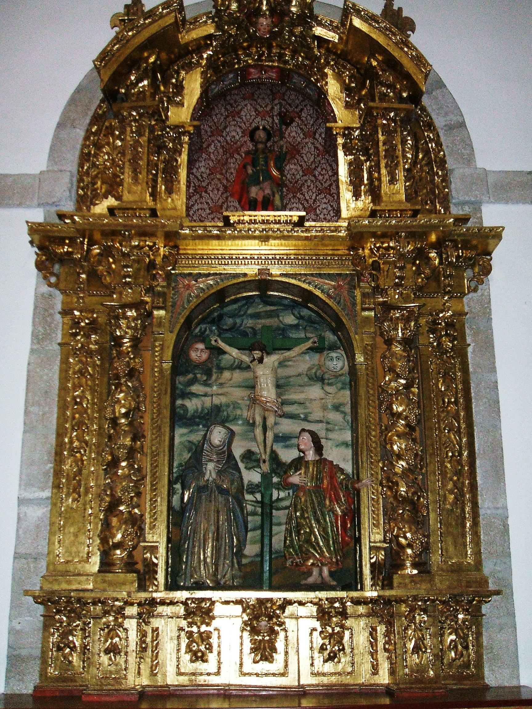 Retablo barroco del Calvario, en la iglesia del Monasterio de MM Cistercienses de San Miguel de las Dueñas, provincia de León, España